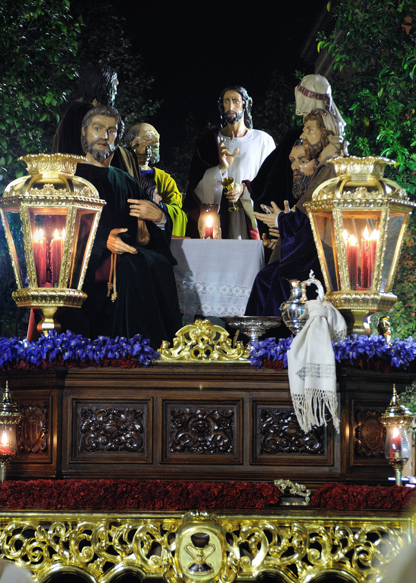 Paso de la Santa Cena, Cofradía de la Institución de la Sagrada Eucaristía.